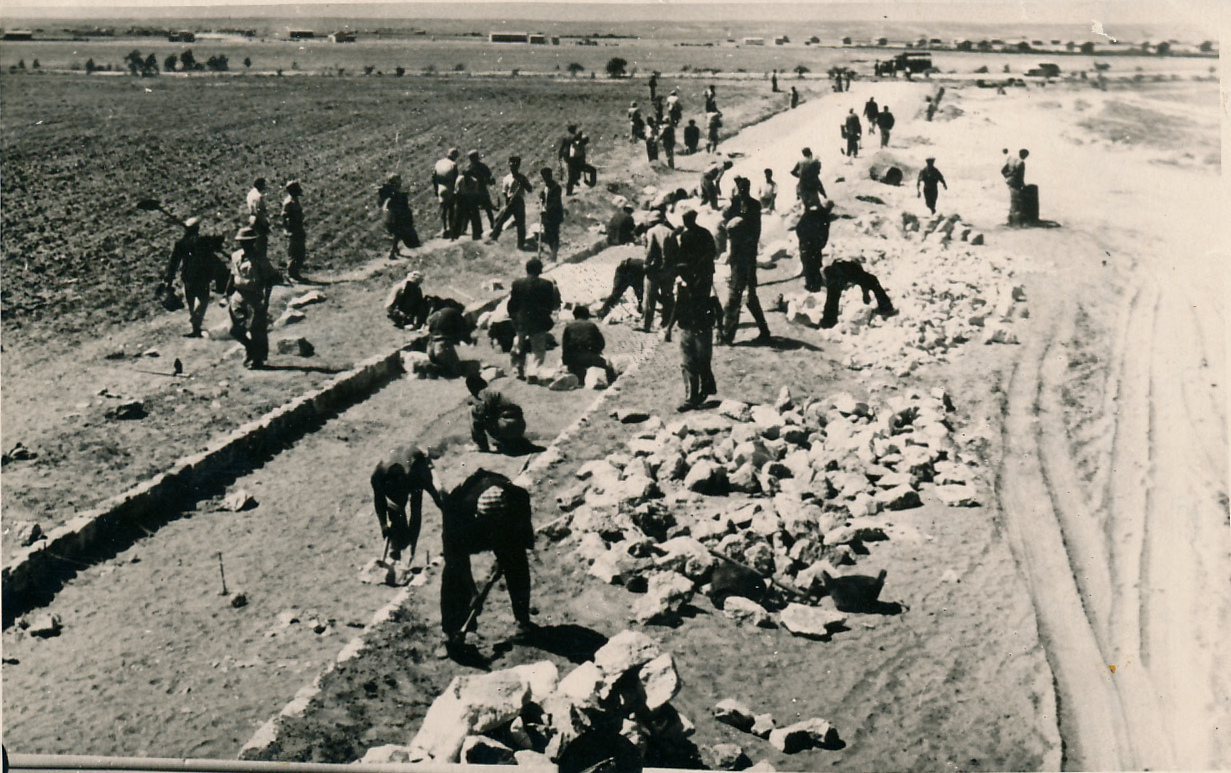 כביש הרעב